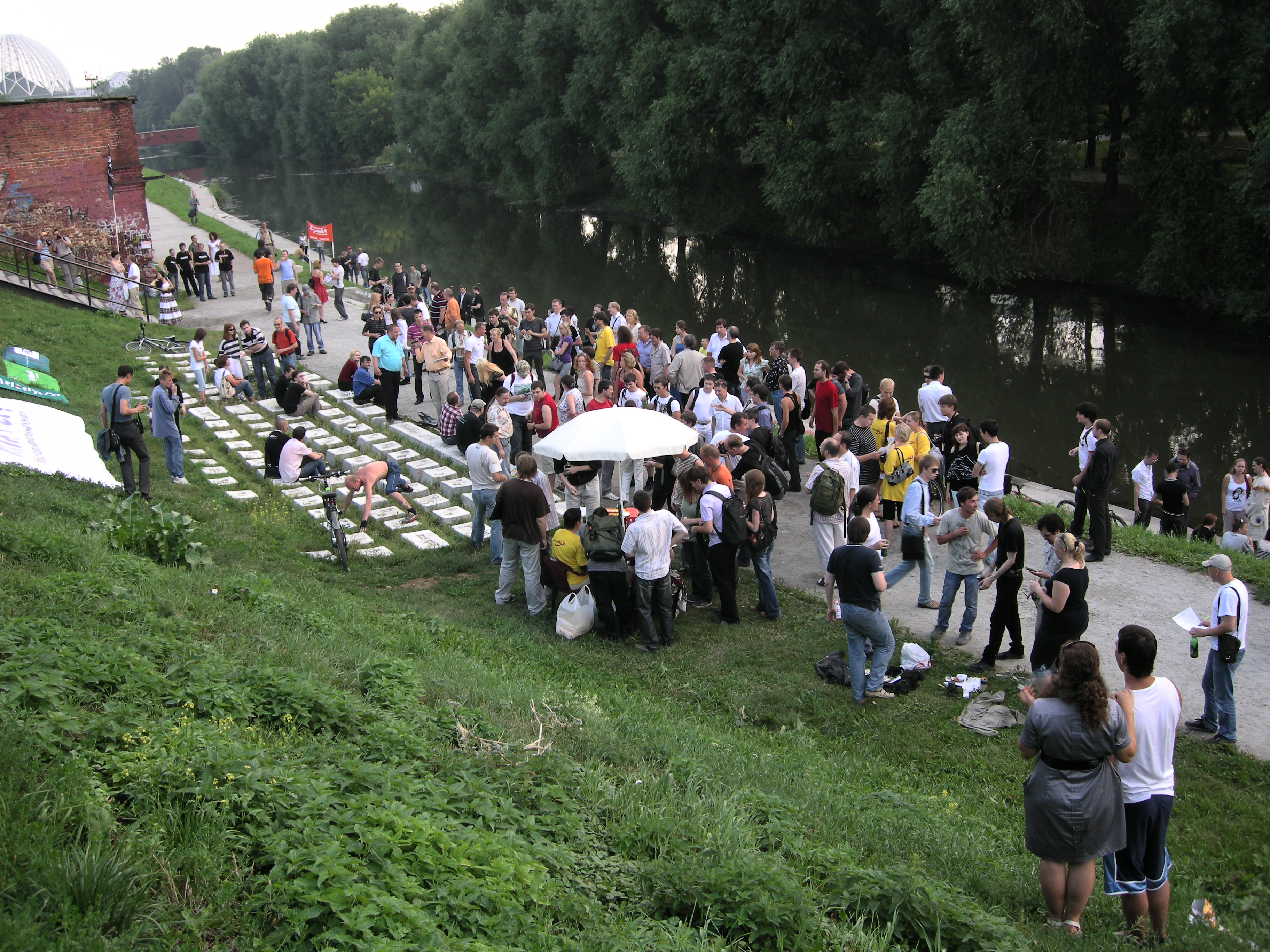 День системного администратора, Памятник Клавиатуры, Екатеринбург, 2011 год